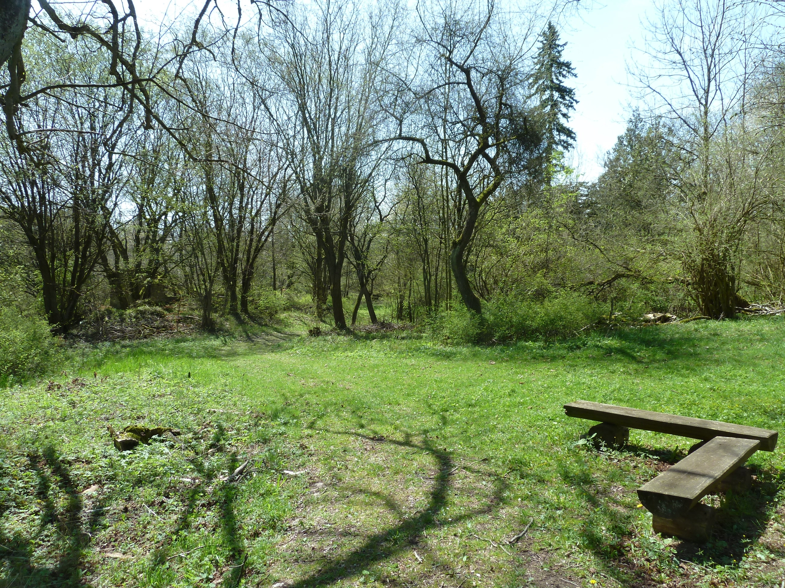 Forsthaus Goburg, nach 1961 an der innerdeutschen Grenze abgerissen, heute Wüstung.